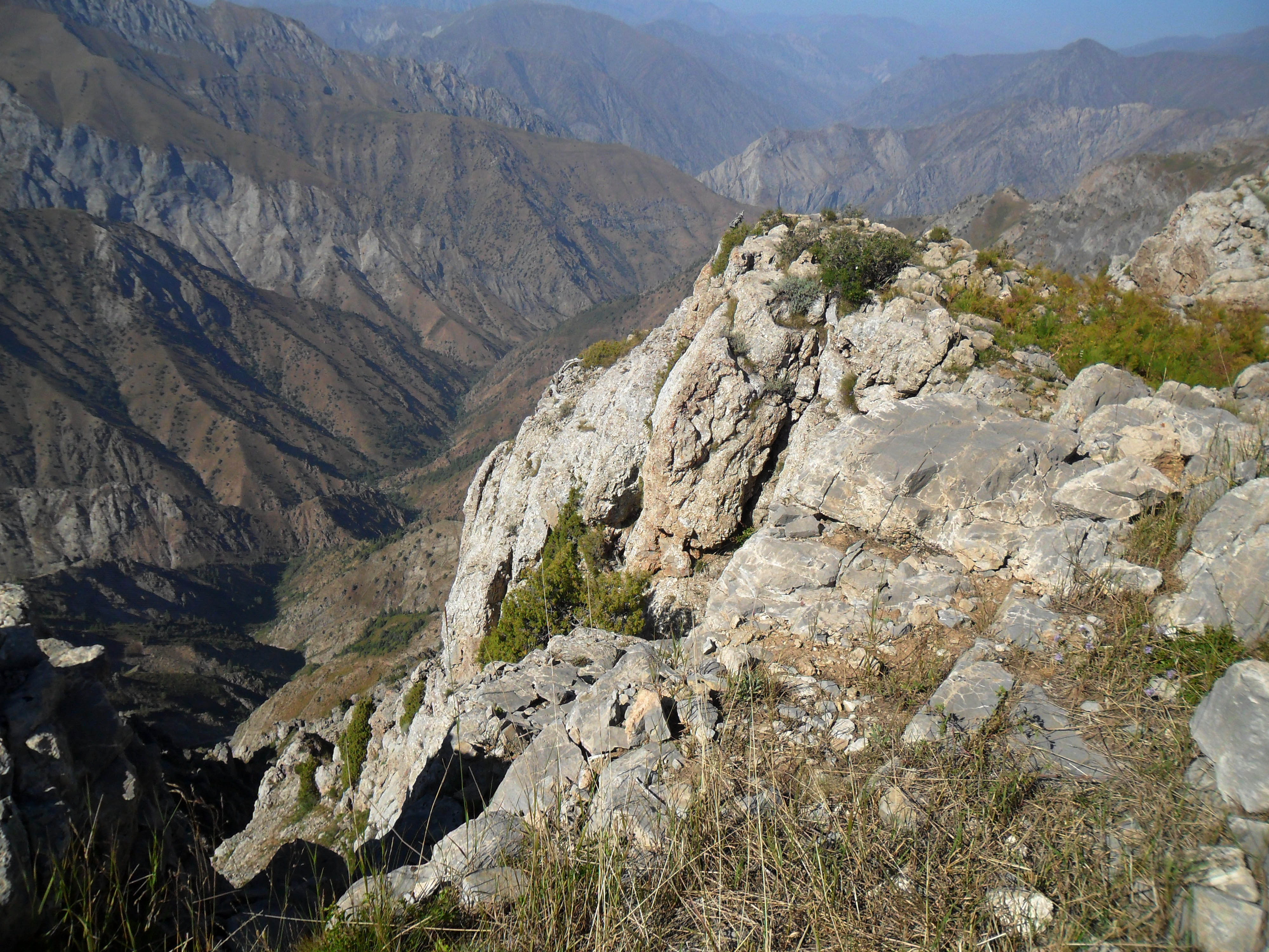 Нижнее течение Караарчи, вид с плато Пулатхан